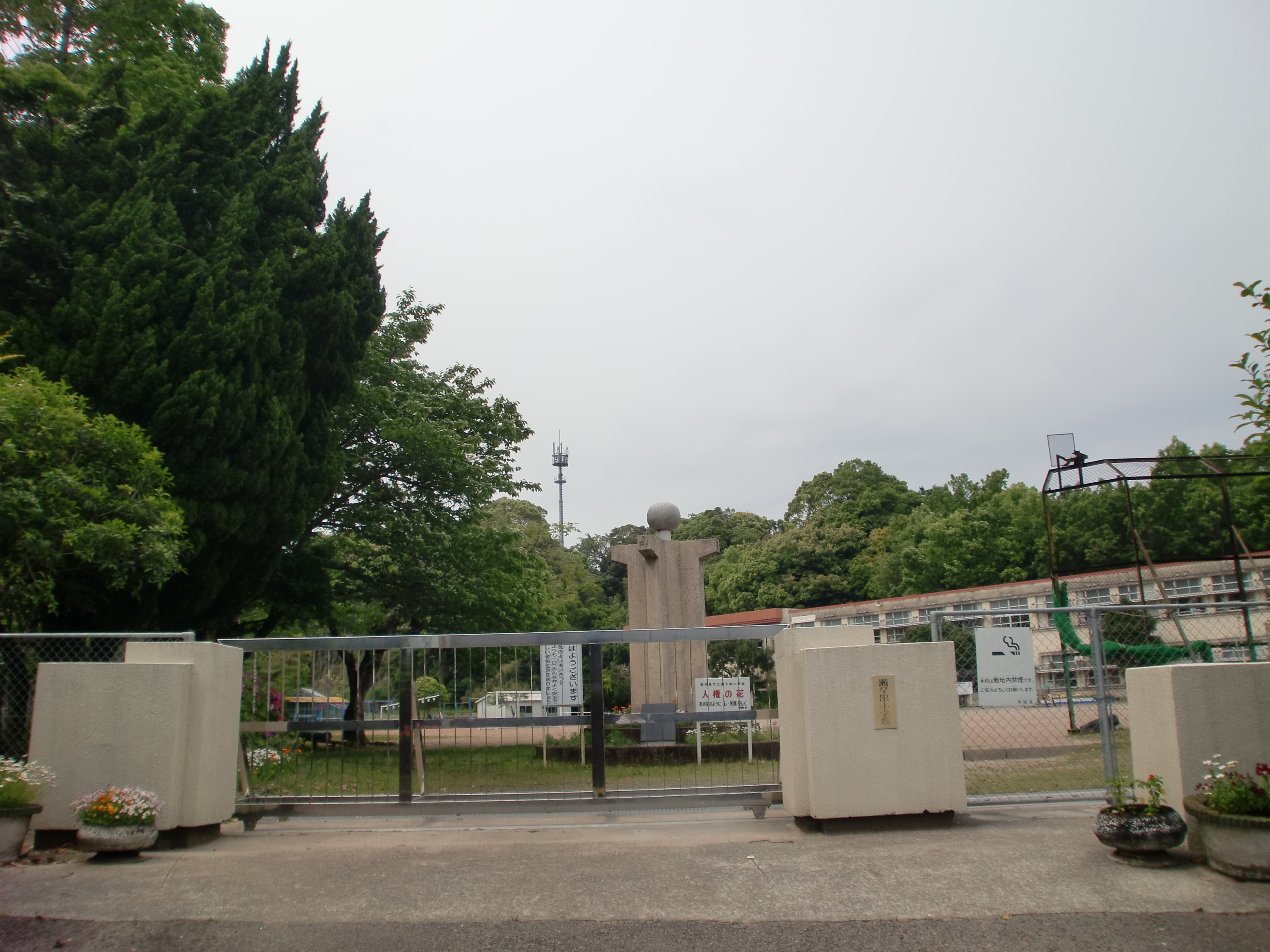 鹿児島市立瀬々串小学校の外観。